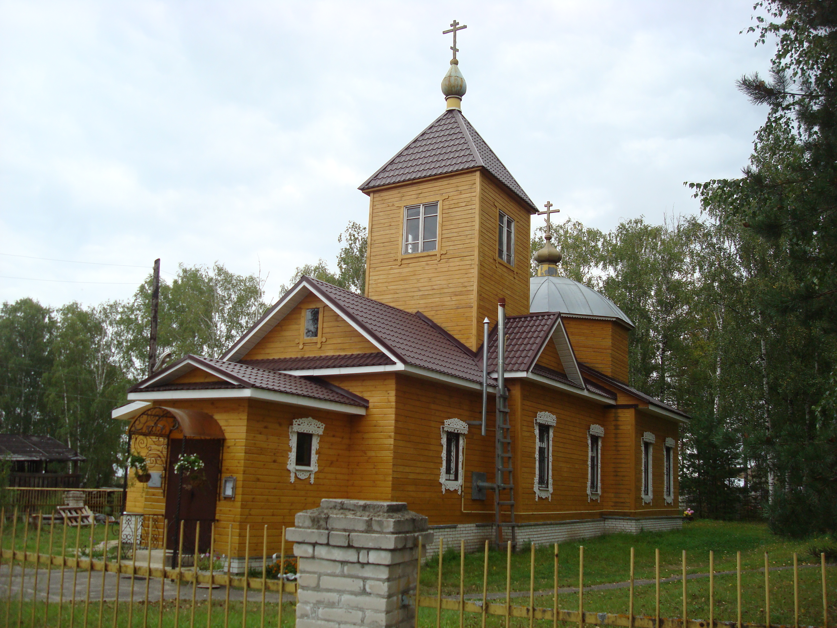 Церковь Успения Богородицы: Войново, Меленковский район, Владимирская область